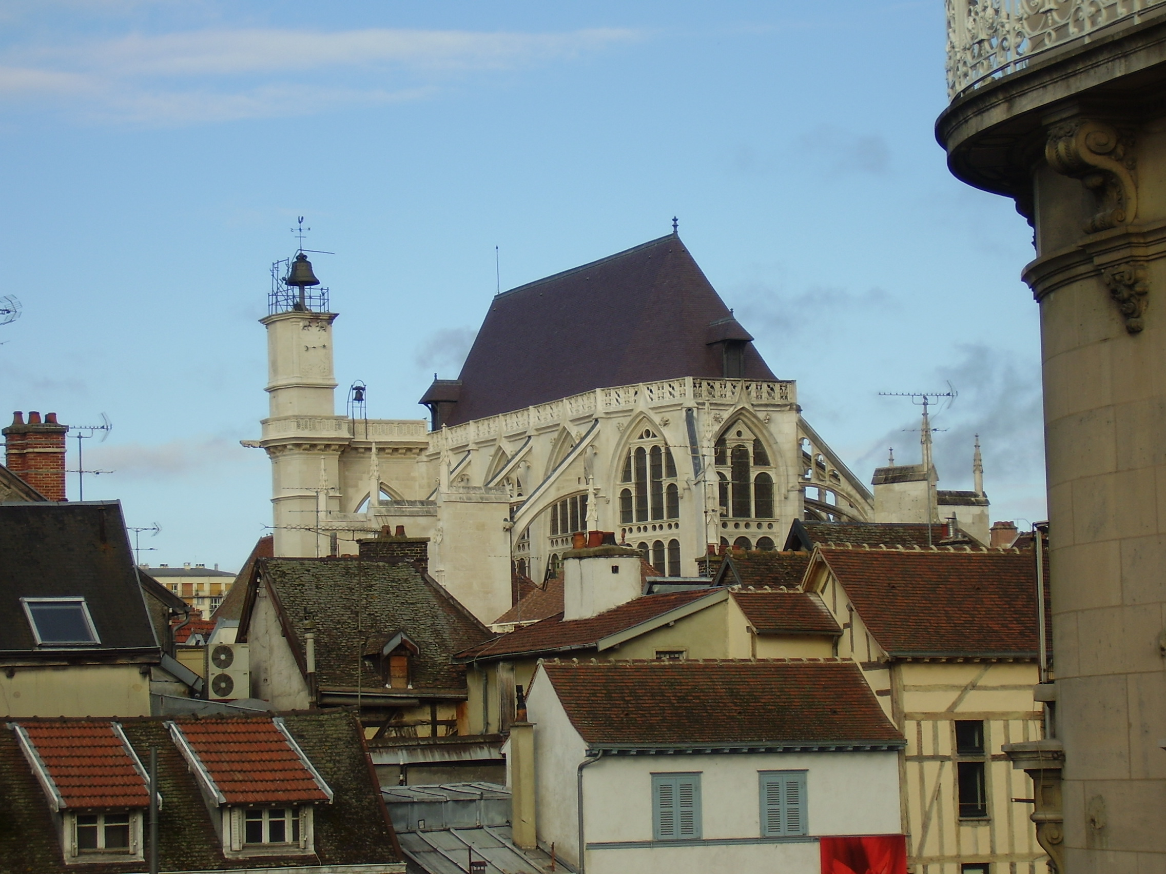 Toits et église Saint-Jean à Troyes (Aube, France).